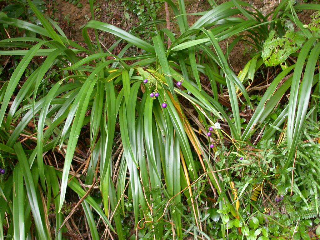 Dianella ensifolia：キキョウラン 2004/08/10 沖縄本島北部：Okinawa Island, Japan